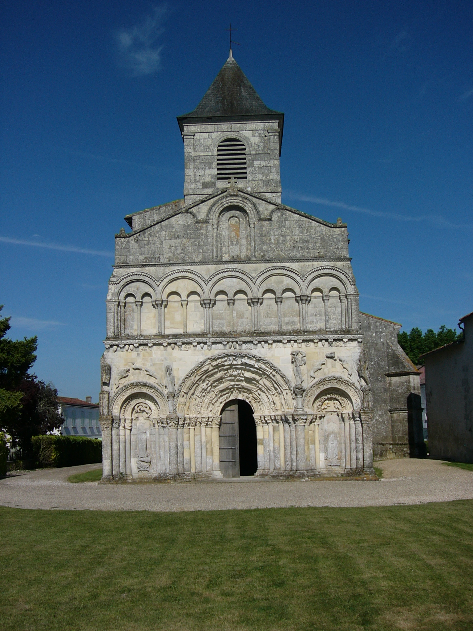 Auteur : koakoo ( Date : le 7 juin 2006 Lieu : Chadenac (FRANCE)